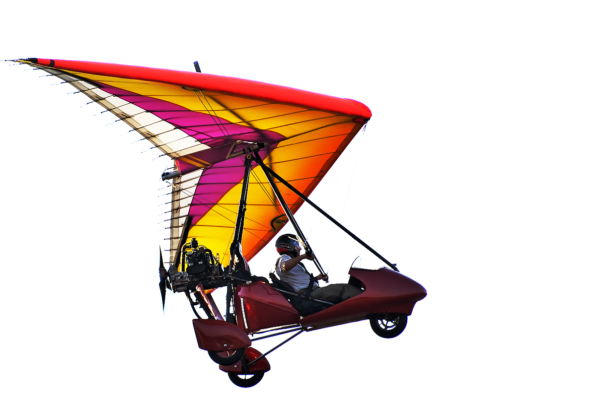 Показательные выступление дельталетов Белгородского клуба сверхлегкой авиации "Академия-Авиа" в рамках 3-его Межрегионального патриотического аэрофестиваля "Небосвод Белогорья"